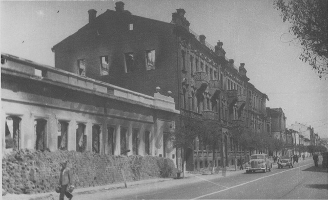 Начало ул. К. Маркса